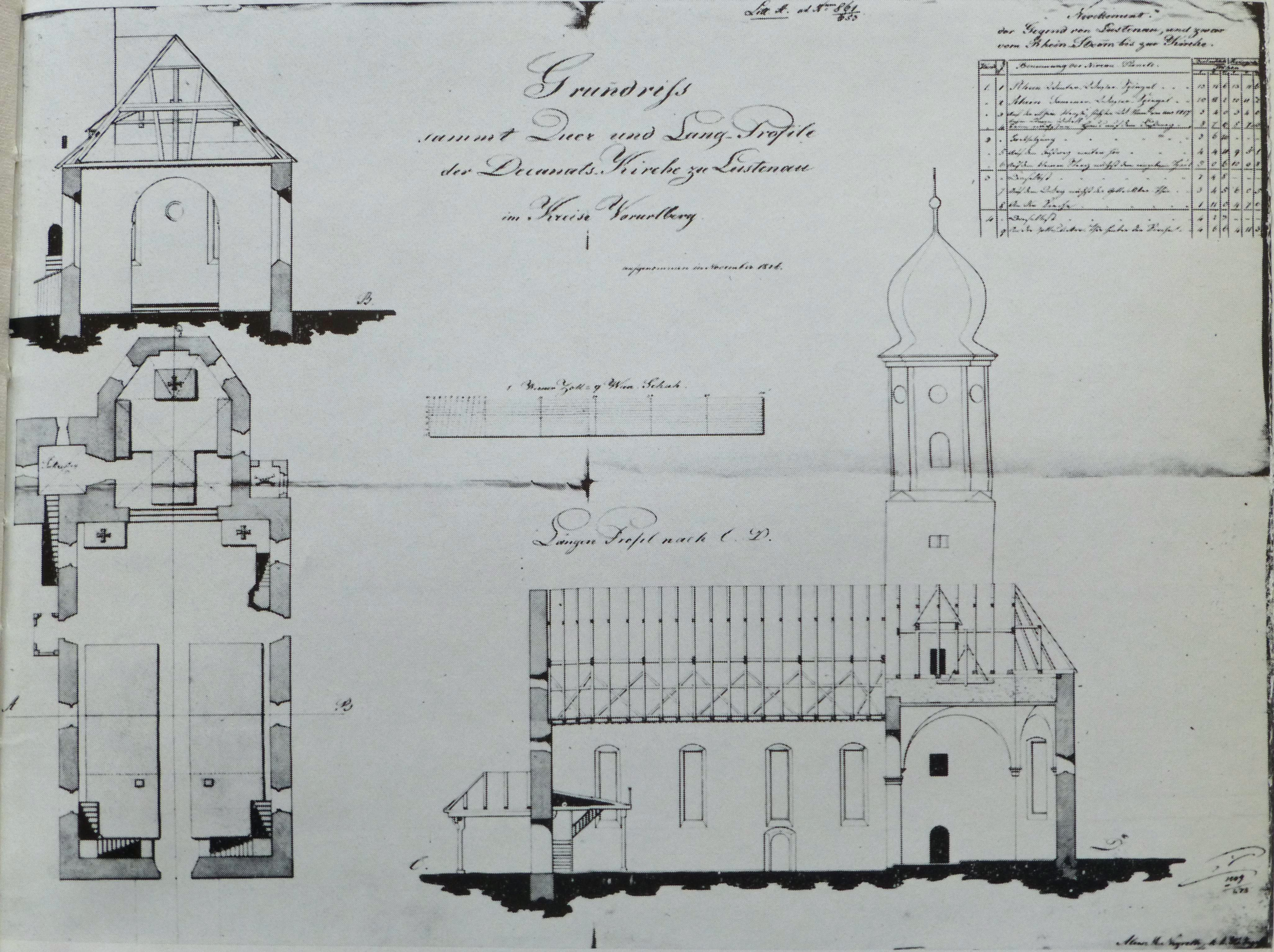 Plan der 1672 gebauten und 1830 abgerissenen Pfarrkirche St. Peter und Paul in Lustenau